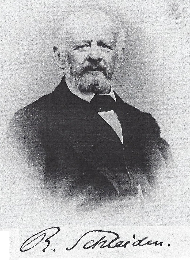 Signierte Porträtfotografie von Rudolf Schleiden (1815-1895)